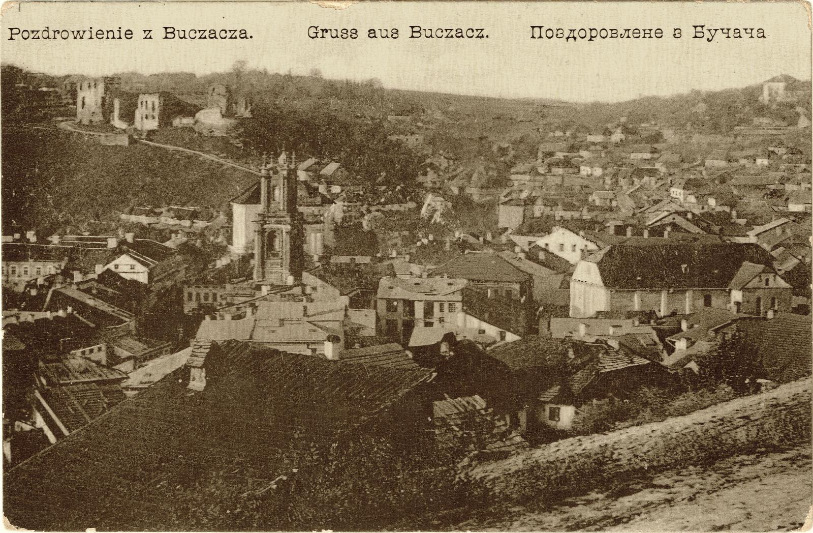 Справа - синагога Бучача, тепер на її місці - ряди базару біля санстанції